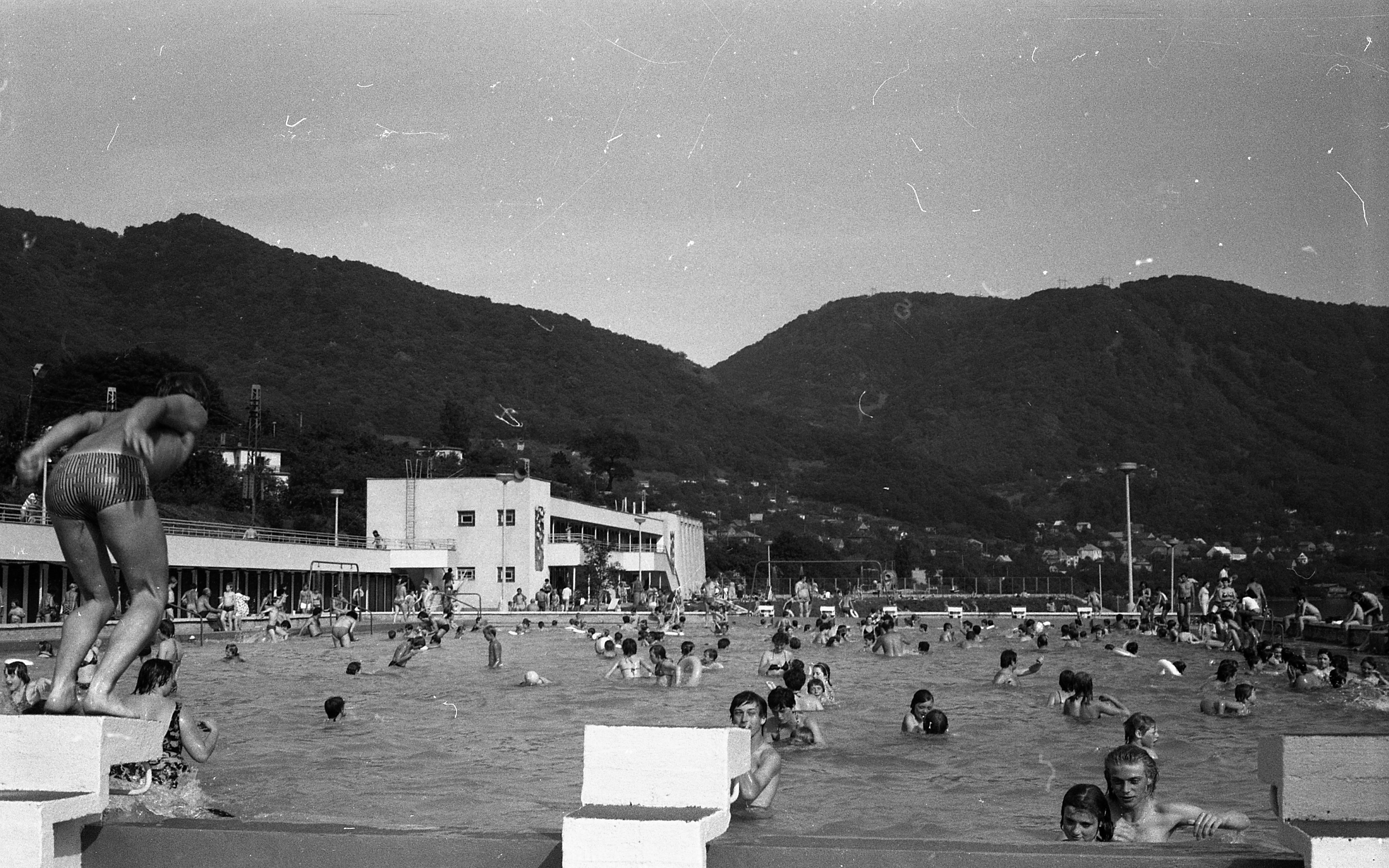 Termální lázně Brná u Ústí nad Labem někdy v 70. letech